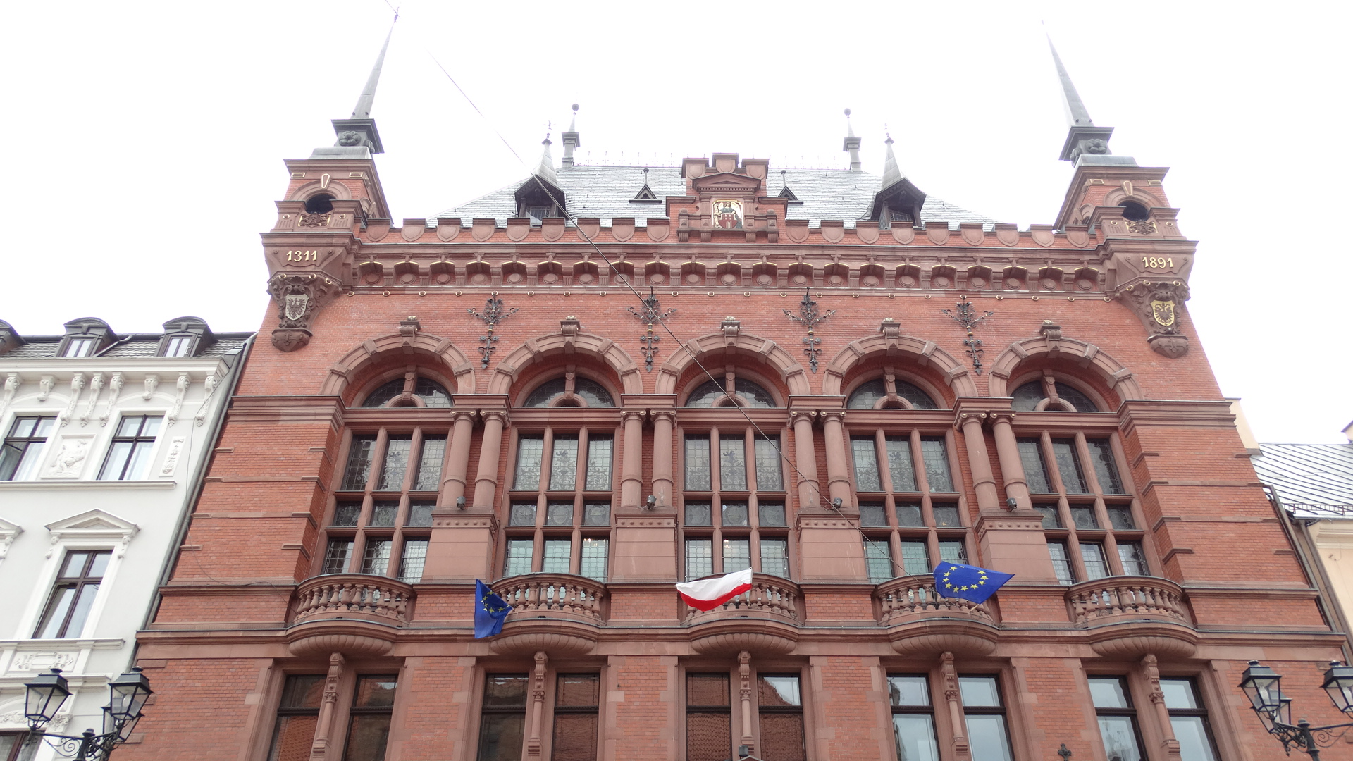 Toruń, Dwór Artusa, 1889-1891